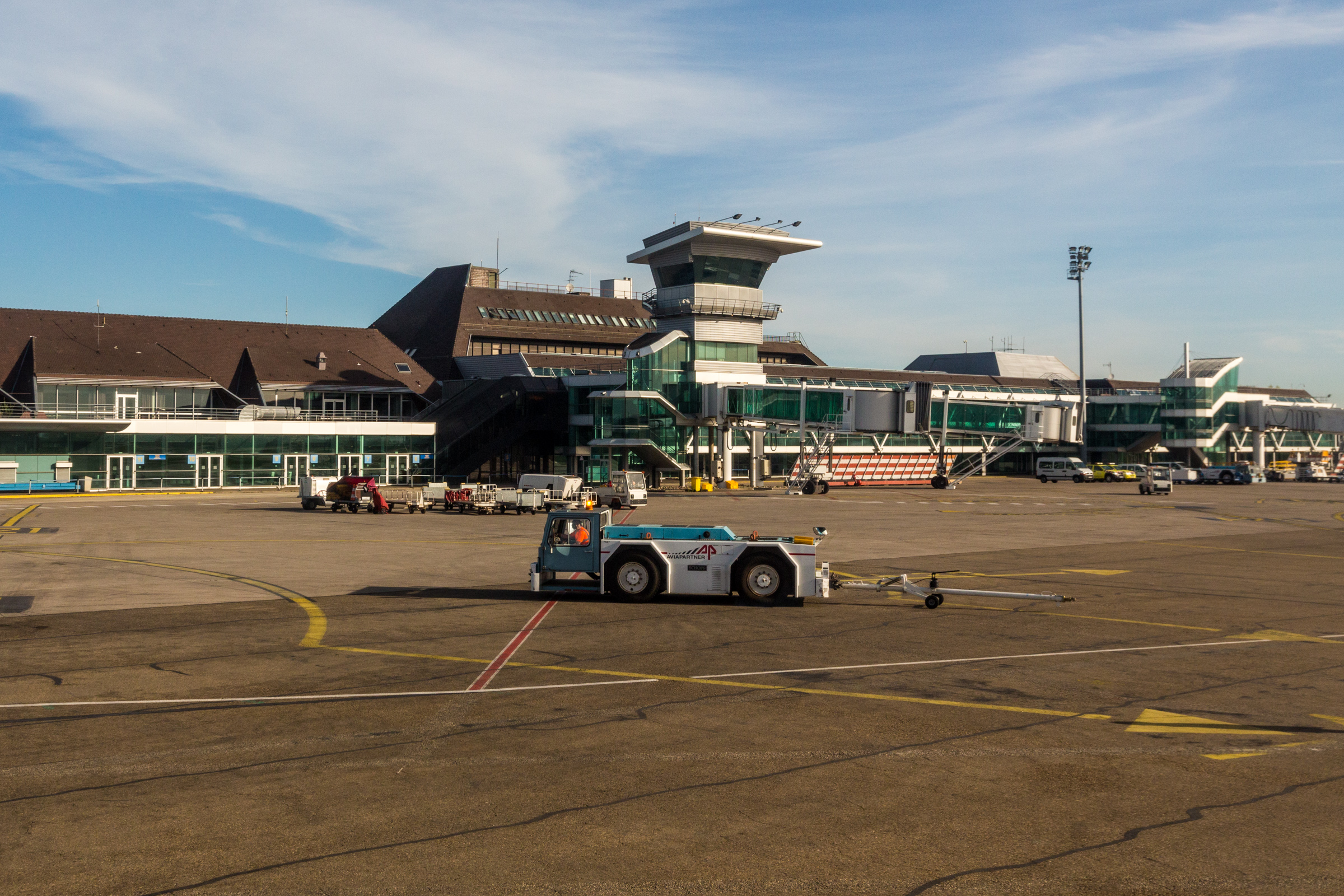 Aéroport Strasbourg Entzheim SXB avril 2015